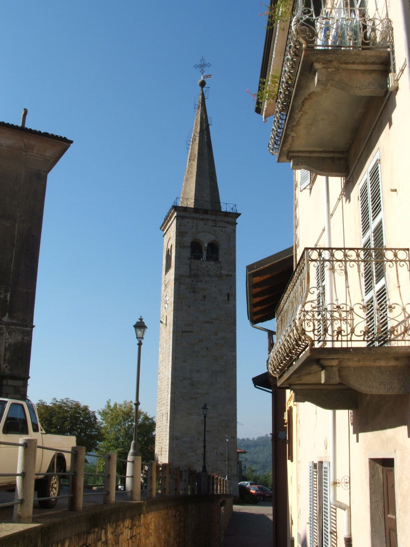 Bioglio (provincia di Biella, Piemonte, Italia) La torre campanaria